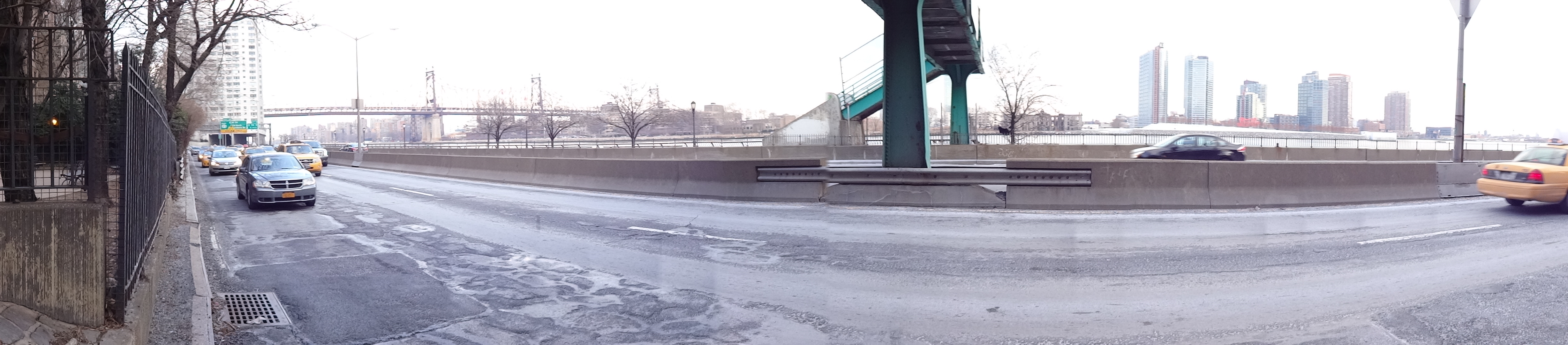 Imagem panorâmica da Franklin D. Roosevelt East River Drive, com a Roosevelt Island e Ed Koch Queensboro Bridge ao fundo.